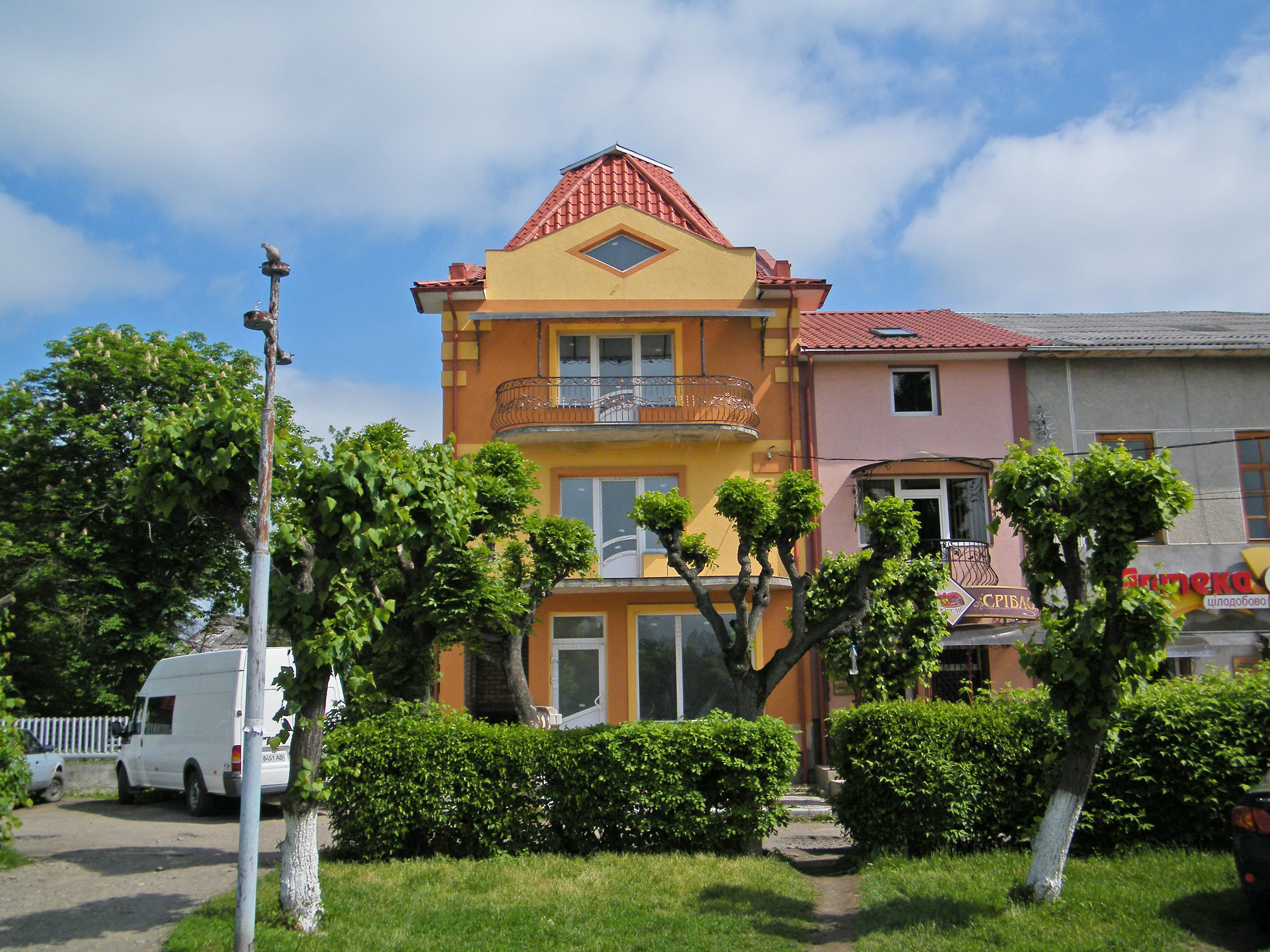 В центре поселка